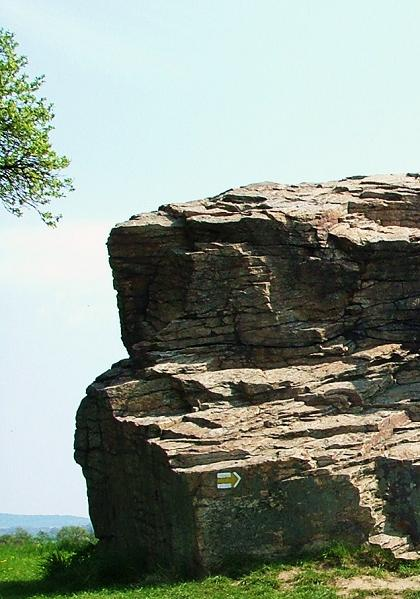 Lechuv Kamen nieopodal miasta Kourim w Czechach.